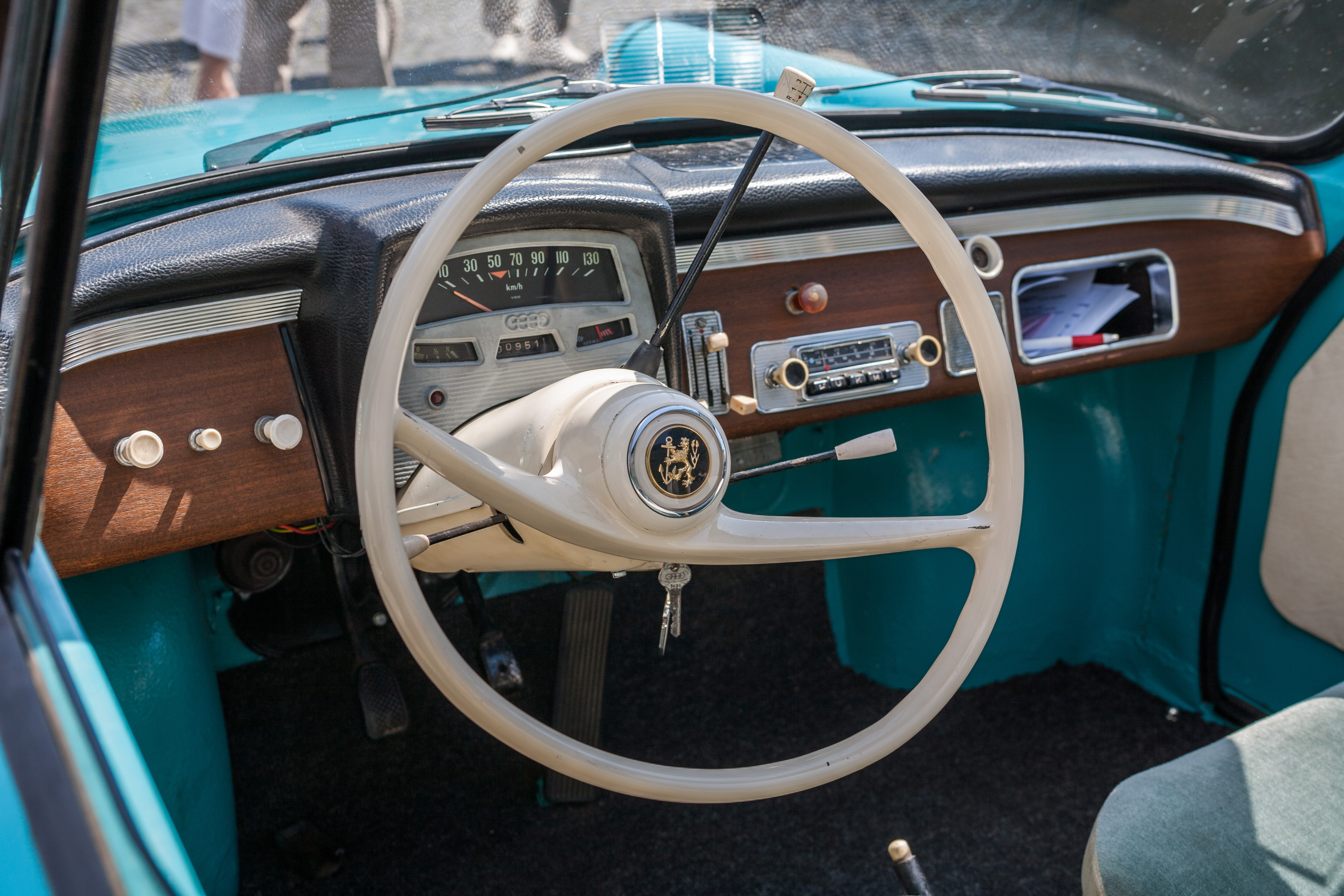 Rheinbach Classics 2007 – Lenkrad und Armaturenbrett eines DKW Junior, Baujahr 1960